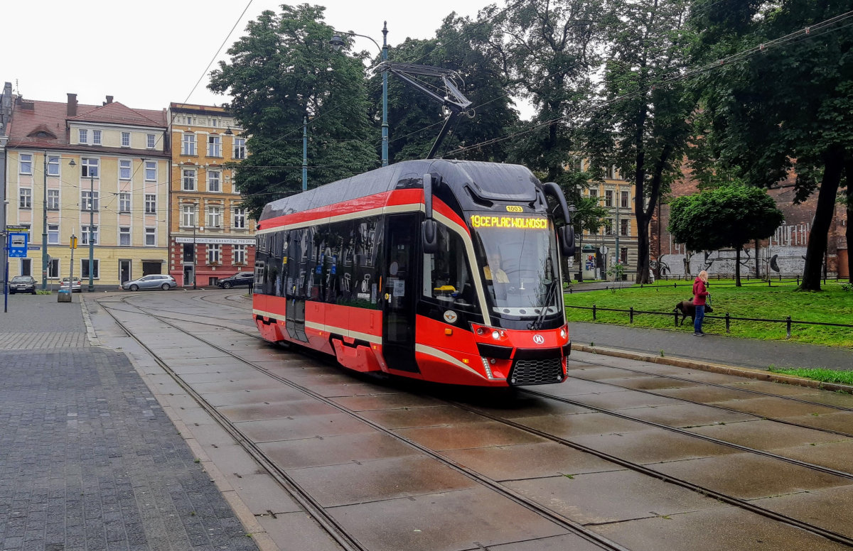 Pierwszy liniowy tramwaj Moderus Beta MF 10 AC w trakcie kursu wyjazdowego jako linia 19.